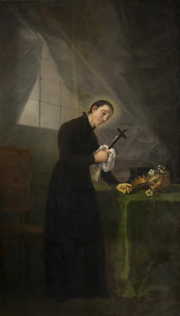 La obra representa a San Luis Gonzaga (1568-1591), jesuita italiano y patrono de la juventud en la Iglesia Católica.